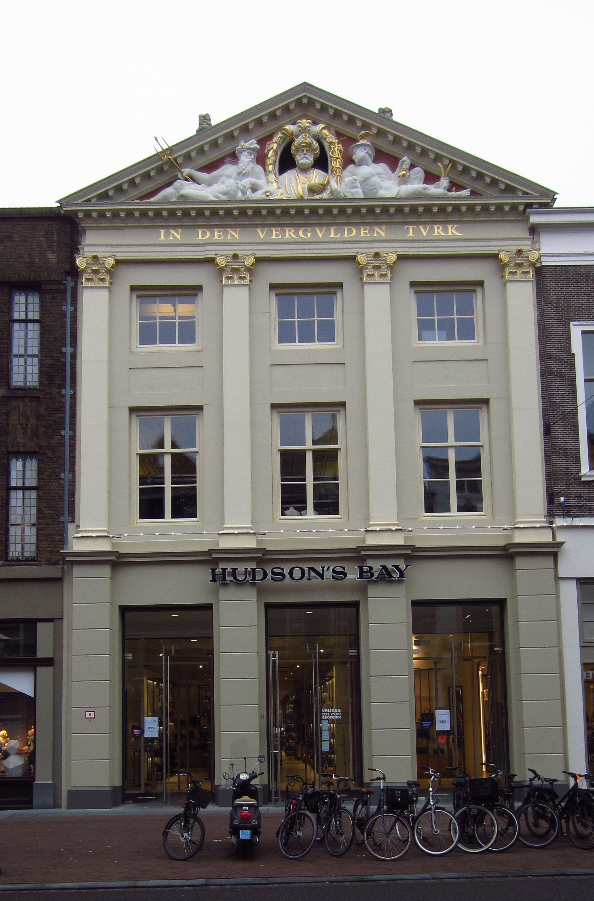 In den vergulden Turk (Breestraat 84 Leiden)